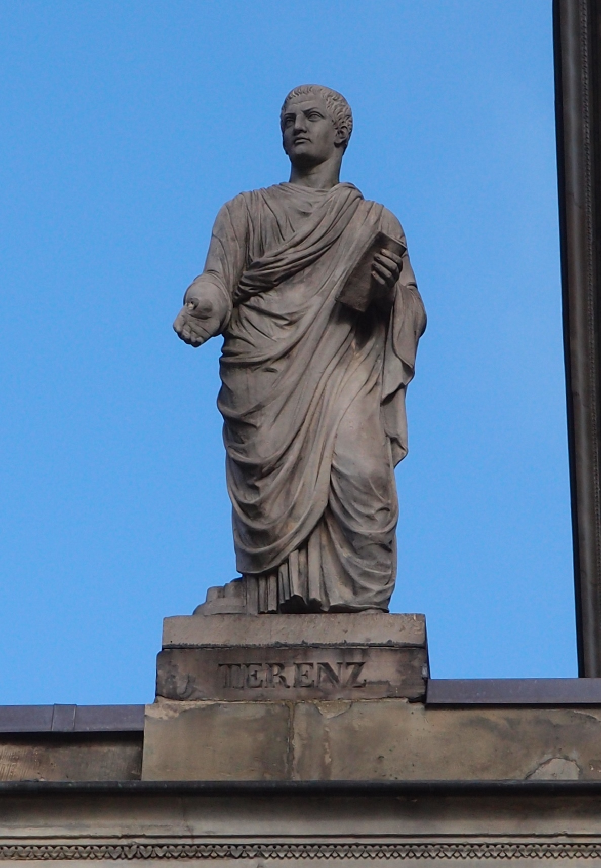 Statue des römischen Komödiendichters Terenz (zwischen 195 und 184 bis 159 oder 158 v. Chr.) auf dem Opernhaus Hannover